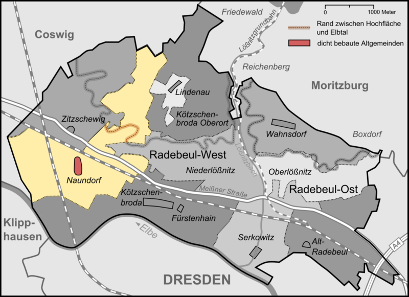 Karte der Stadtteile und Umlandgemeinden Radebeuls, hier Stadtteil Naundorf